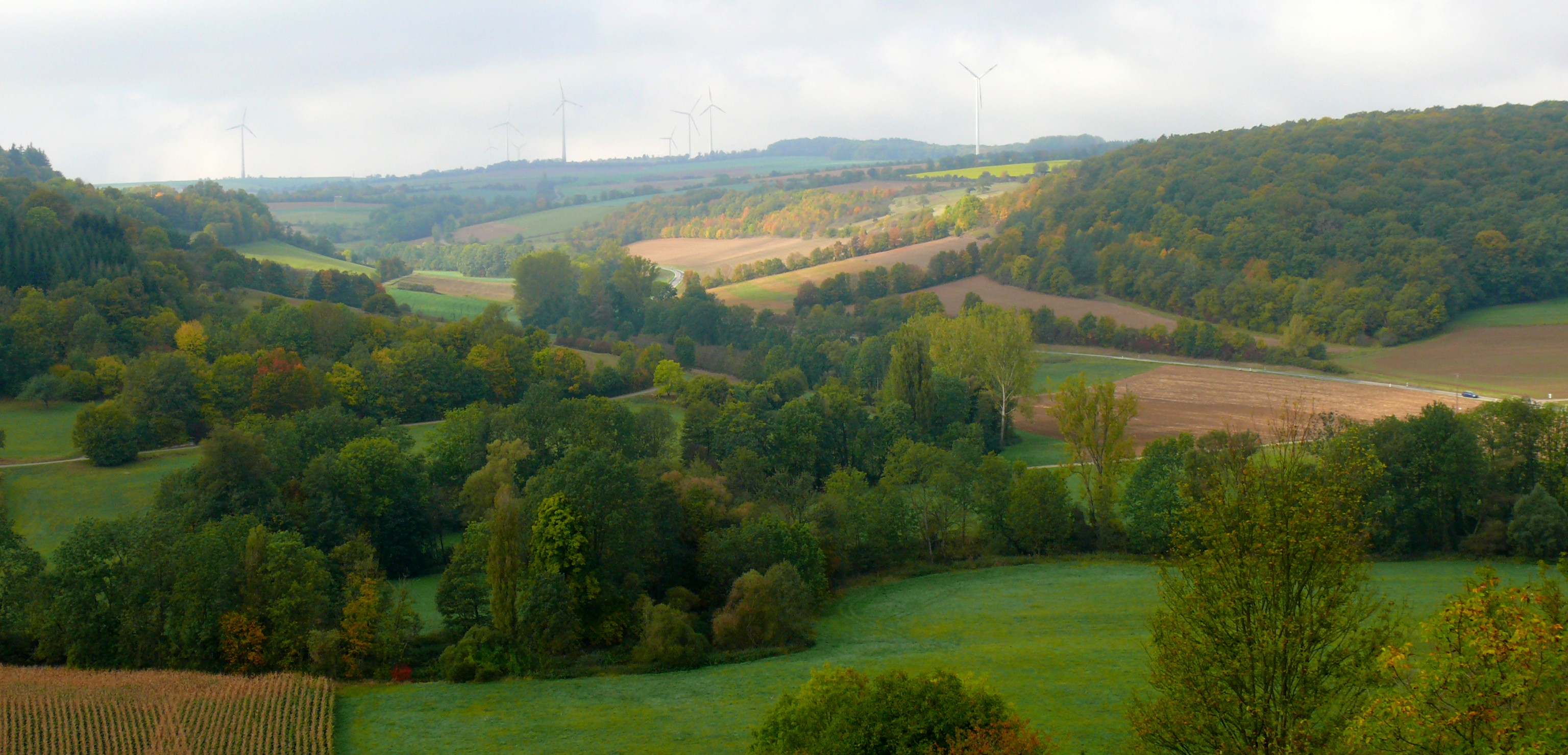 Blick vom Kulturlandschaftspfad oberhalt Creglingens auf das Taubertal, eine ideale Landschaft für Tiere, Pflanzen und Wanderer